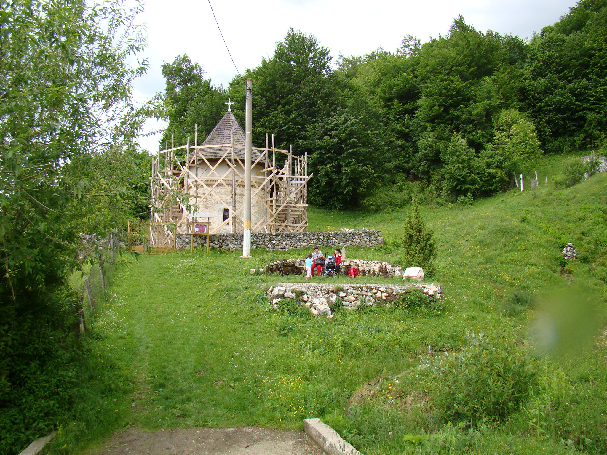 Biserica "Sf. Nicolae" a fostului schit "De sub Piatră" din satul Pietreni, județul Vâlcea